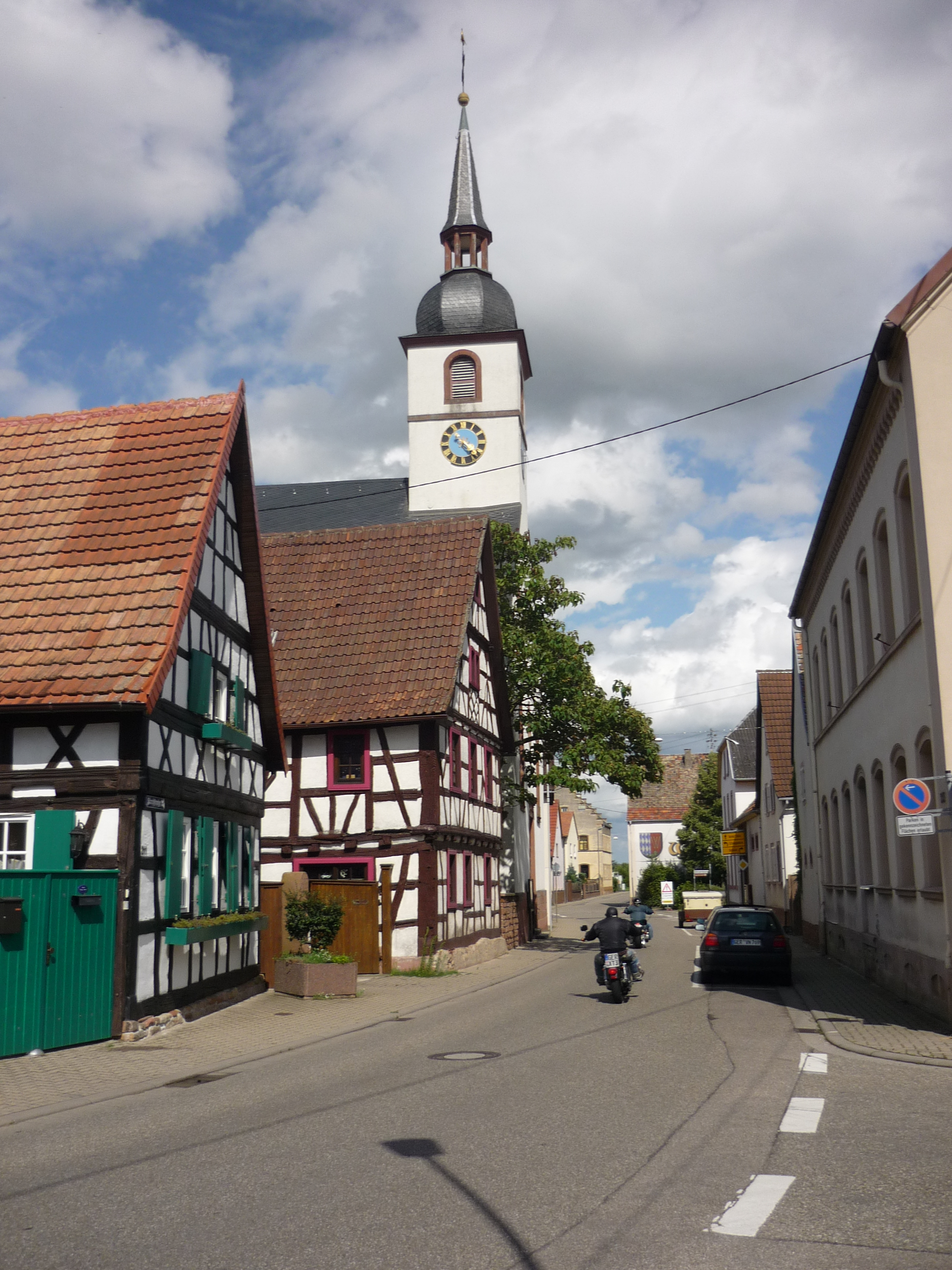 Kirche Westheim (Pfalz); Kirchstraße 214: Evangelische Pfarrkirche; davor Kirchstraße 212 und 211: Fachwerkhäuser